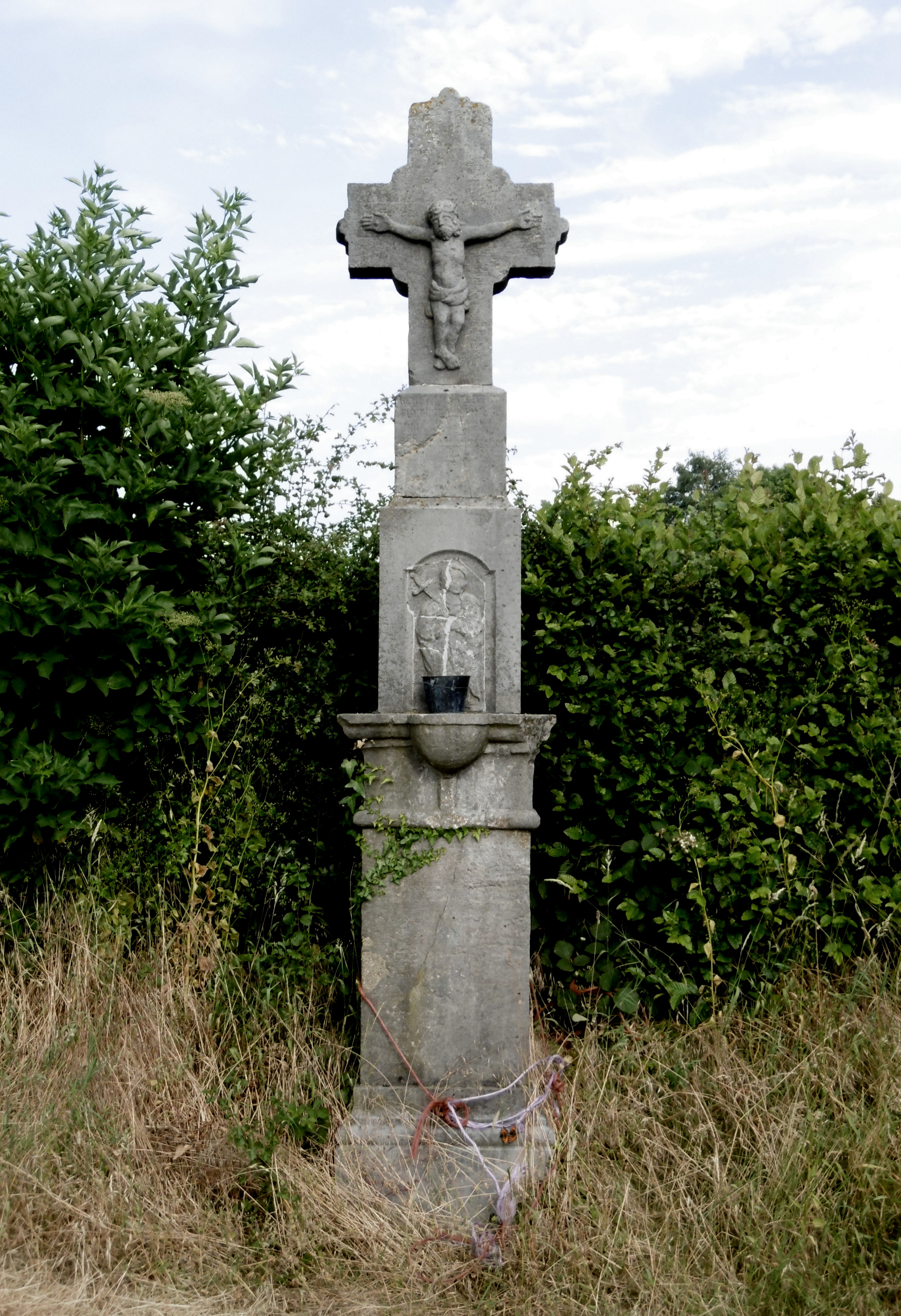 Wegekreuz an der Grünstraße gegenüber Haus-Nr. 9 in Aachen-Walheim